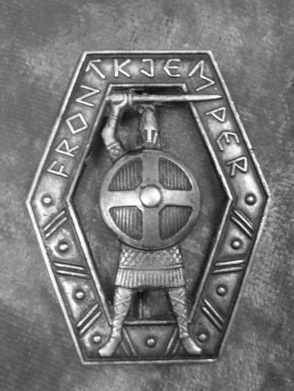 Frontkjempermerket i sølv. Statuttene for utmerkelsen stod omtalt i Aftenposten 2. september 1943 under overskriften Den første norske utmerkelse til våre frontkjempere: 1. Frontkjempermerket er innstiftet av ministerpresident Vidkun Quisling til belønning av frivillige som har tjenstgjortved fronten til lands til sjøs eller i luften. 2. Frontkjempermerket er i sølv. Emblemet er en viking med hevet sverd og med solkorset som skjold, i en sekskantet ramme hvori står «frontkjemper» i de øverste 3 ledd. 3. Frontkjemperne søker selv om merket gjennom Frontkjemperkontoret. Etter innstilling av et utvalg, oppnevnt av Ministerpresidenten, avgjør han om tildeling skal finne sted. Intil Ministerpresidenten anderledes bestemmer, består utvalget av et medlem fra Den norske Legion, et fra Waffen SS og av Frontkjemperkontorets leder. 4.Frontkjempermerket blir vedkommendes eiendom. Det bæres ppå venstre side av brystet som vanlige dekorasjoner. Hederstegnet ble utført etter tegning av Harald Damsleth.